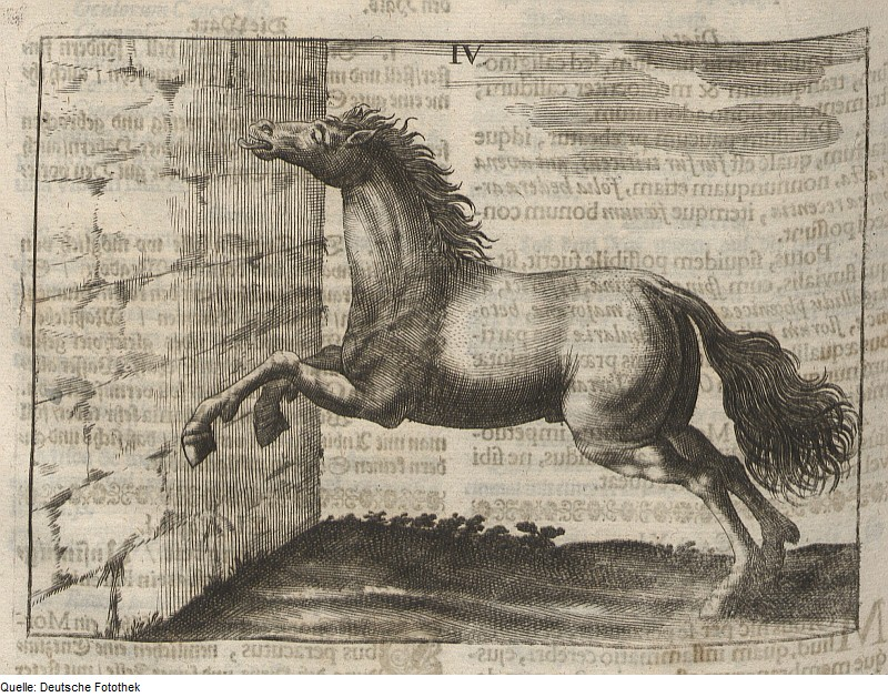 Original image description from the Deutsche Fotothek Nutztierhaltung & Tiermedizin & Pferd & Krankheit